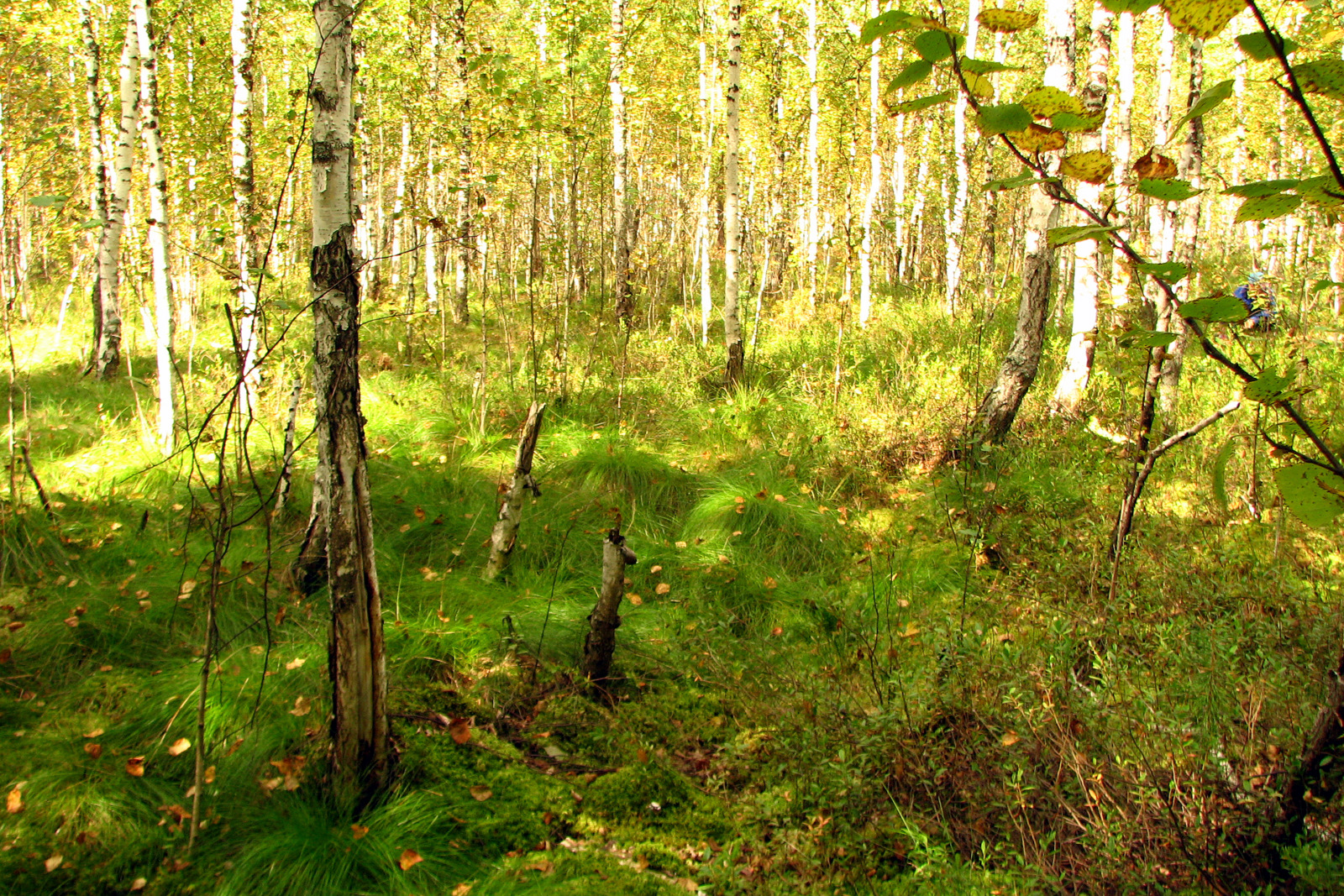 Заболоченный лес к северу от Бутакова.